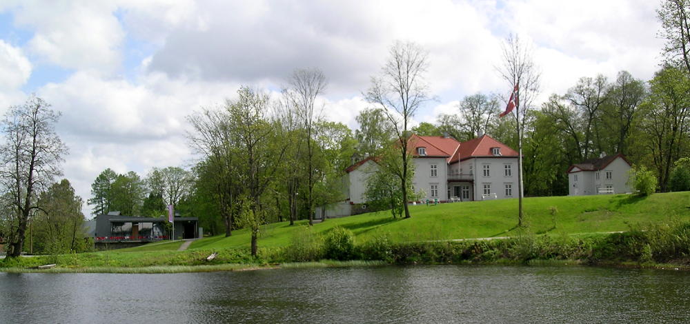 Eidsvollsbygningen med Andelva i forgrunnen. Publikumssenteret Wergelands hus til venstre.